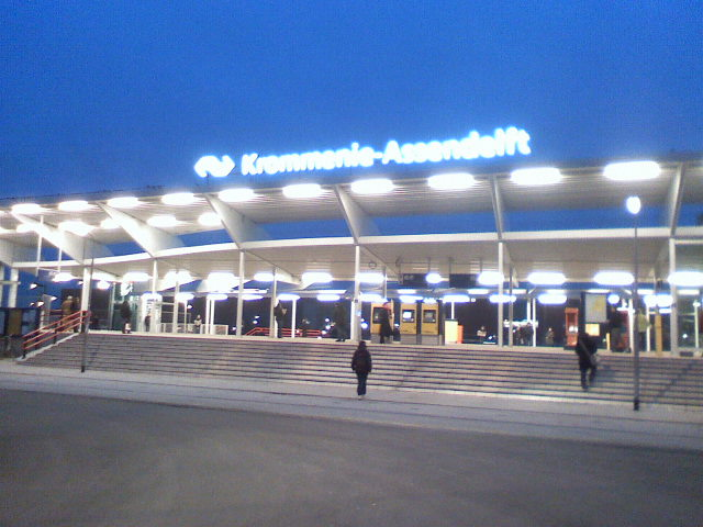 Het nieuwe station: Krommenie-Assendelft